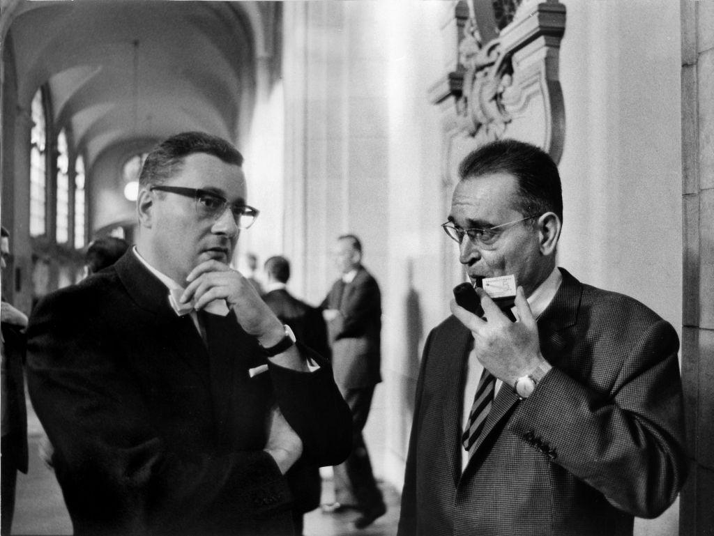 Ludwig Binder: Studentenrevolte 1967/68, West-Berlin; veröffentlicht vom Haus der Geschichte der Bundesrepublik Deutschland